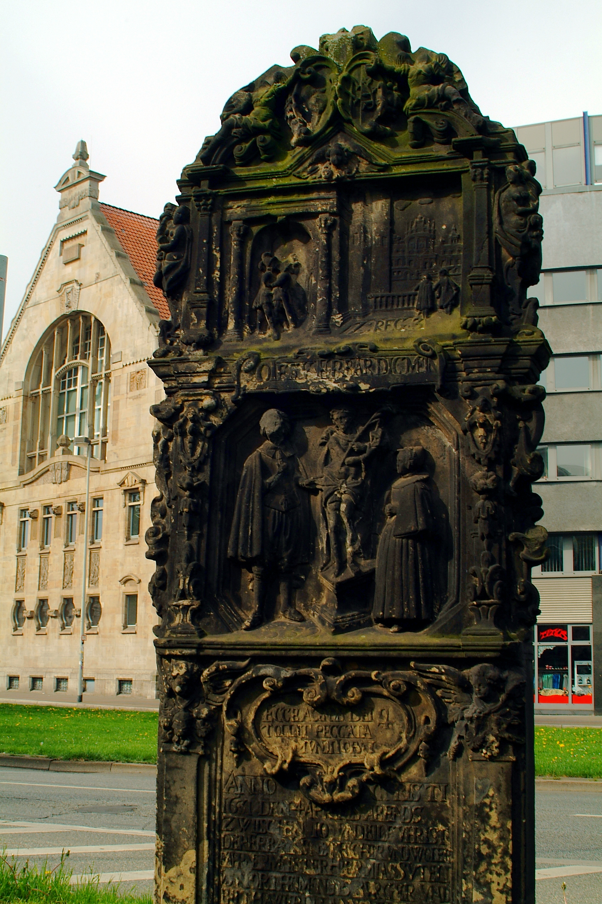 Detail der Grabstele des Bildhauers Jeremias Sutel, geschaffen von seinem allgemein als Schüler angesehenen Bildhauer Ludolf Witte, auf dem Alten St.-Nikolai Friedhof in Hannover, im Hintergrund links ein Teil des Gebäudes der Kestner-Gesellschaft, früher das städtische Goseriedebad